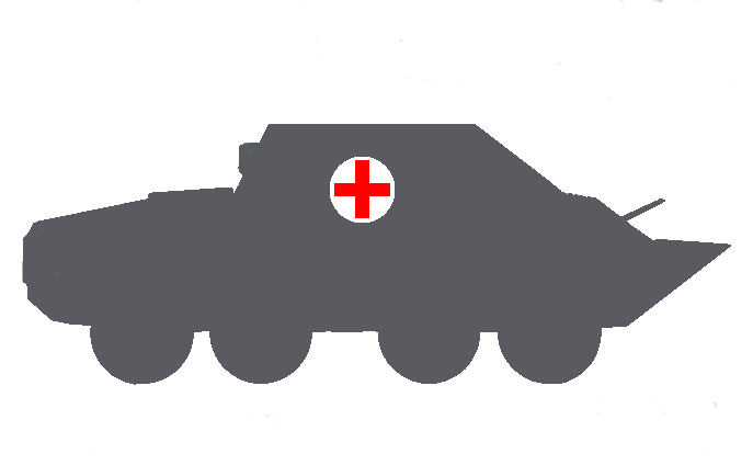 БММ-70 «Ковчег»